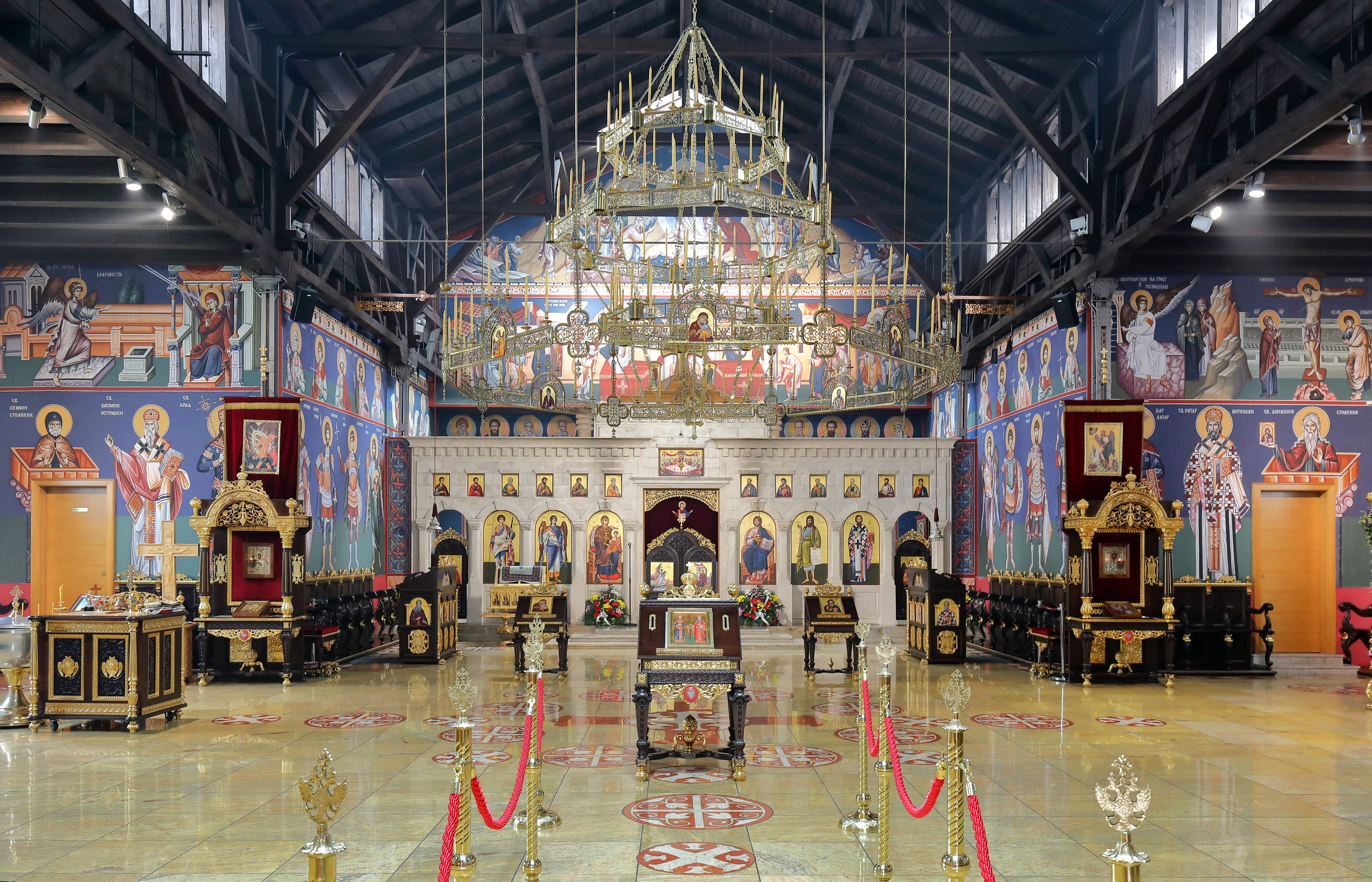 Innenansicht der serbisch-orthodoxen Auferstehungskirche an der Adresse Engerthstraße 158 im 2. Wiener Gemeindebezirk Leopoldstadt. Die Auferstehungskirche wurde in einer aufgelassenen Straßenbahngarage errichtet und am 26. Oktober 2002 geweiht. Ab 2006 fand ein Umbau statt, der mit der Neueinweihung der Kirche am 30. September 2007 abgeschlossen wurde. Bei dem Umbau wurden unter anderem die zwei Kirchtürme errichtet.